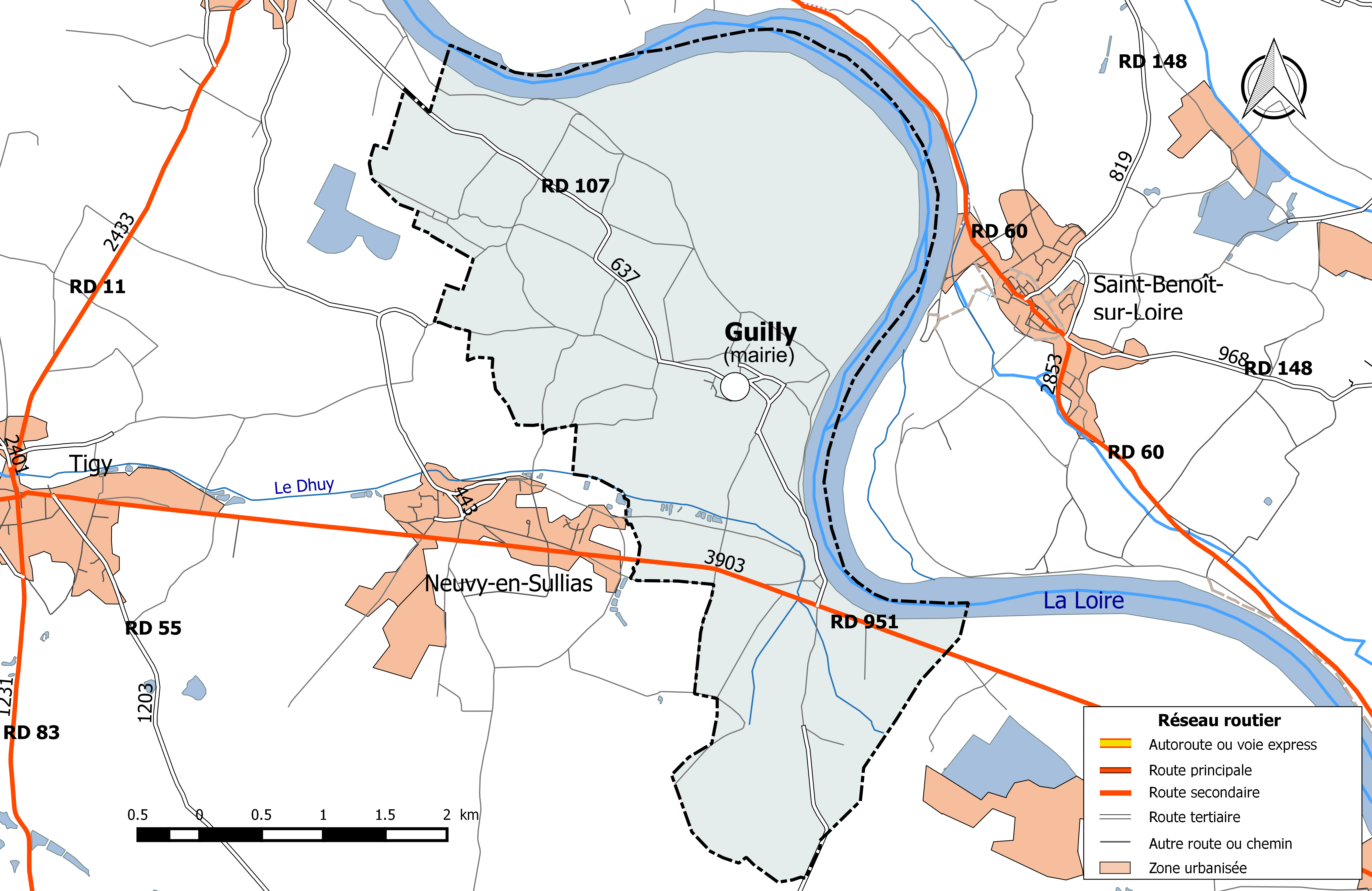 Carte du réseau routier de la commune de Guilly (Loiret).